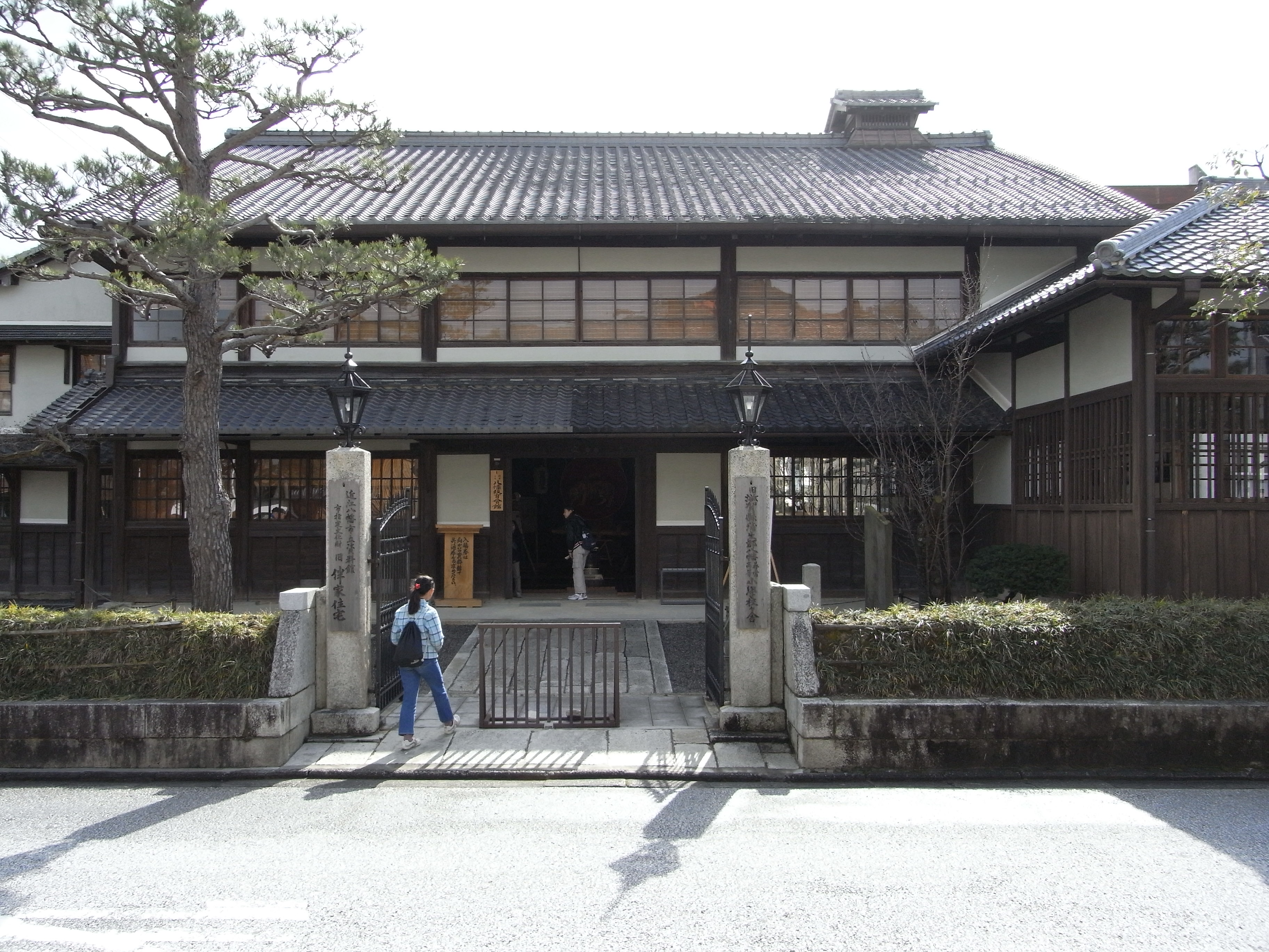 滋賀県近江八幡市、近江八幡市立資料館（旧伴家住宅）。1935年から1997年には図書館として使用された。